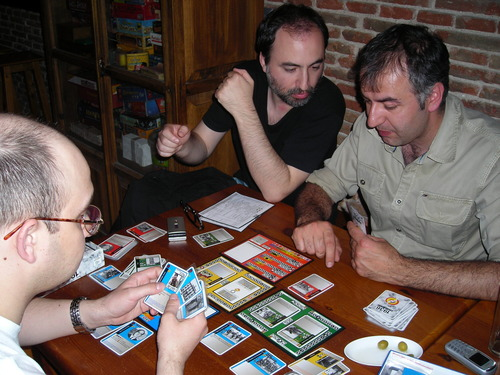 Partida de 1936 Guerra Civil. De negro, al fondo, su creador Arturo García.